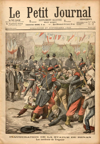 Landreger. Le Petit Journal. 27-09-1903